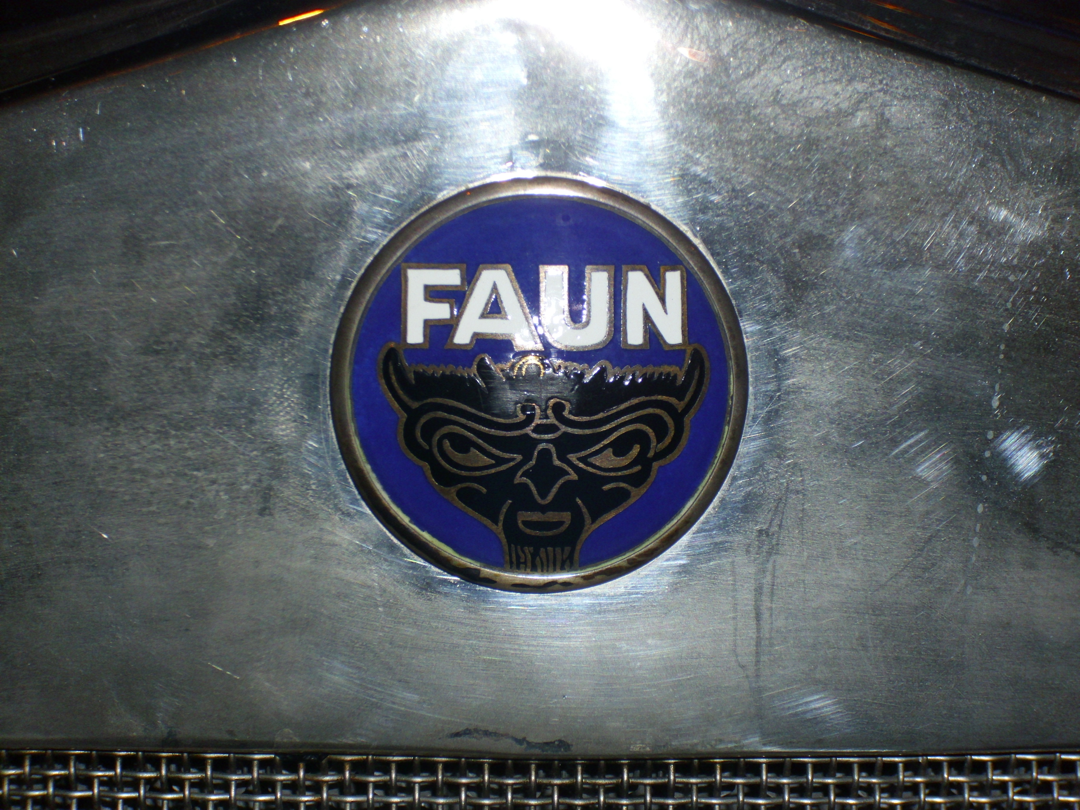 Emblem Faun